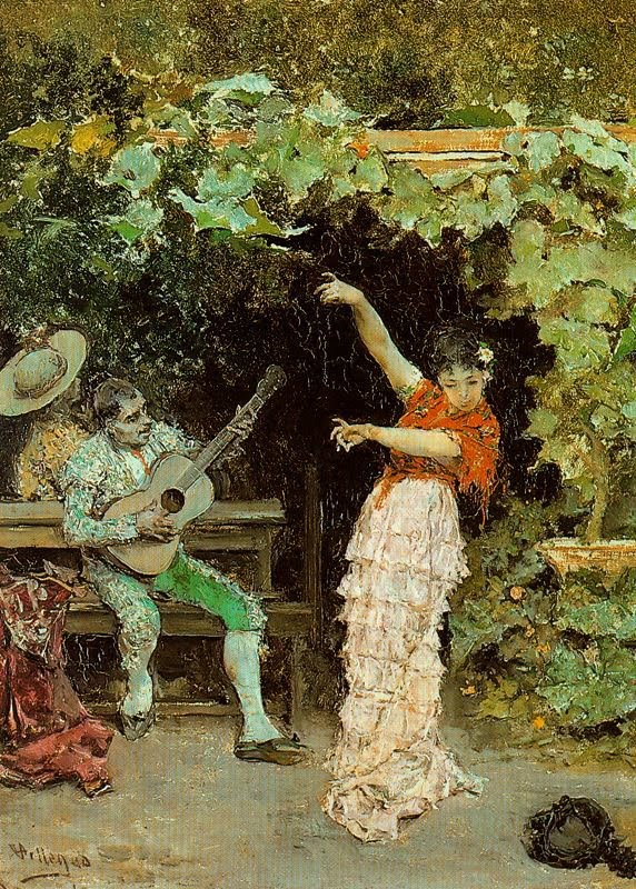 Baile andaluz con emparrado